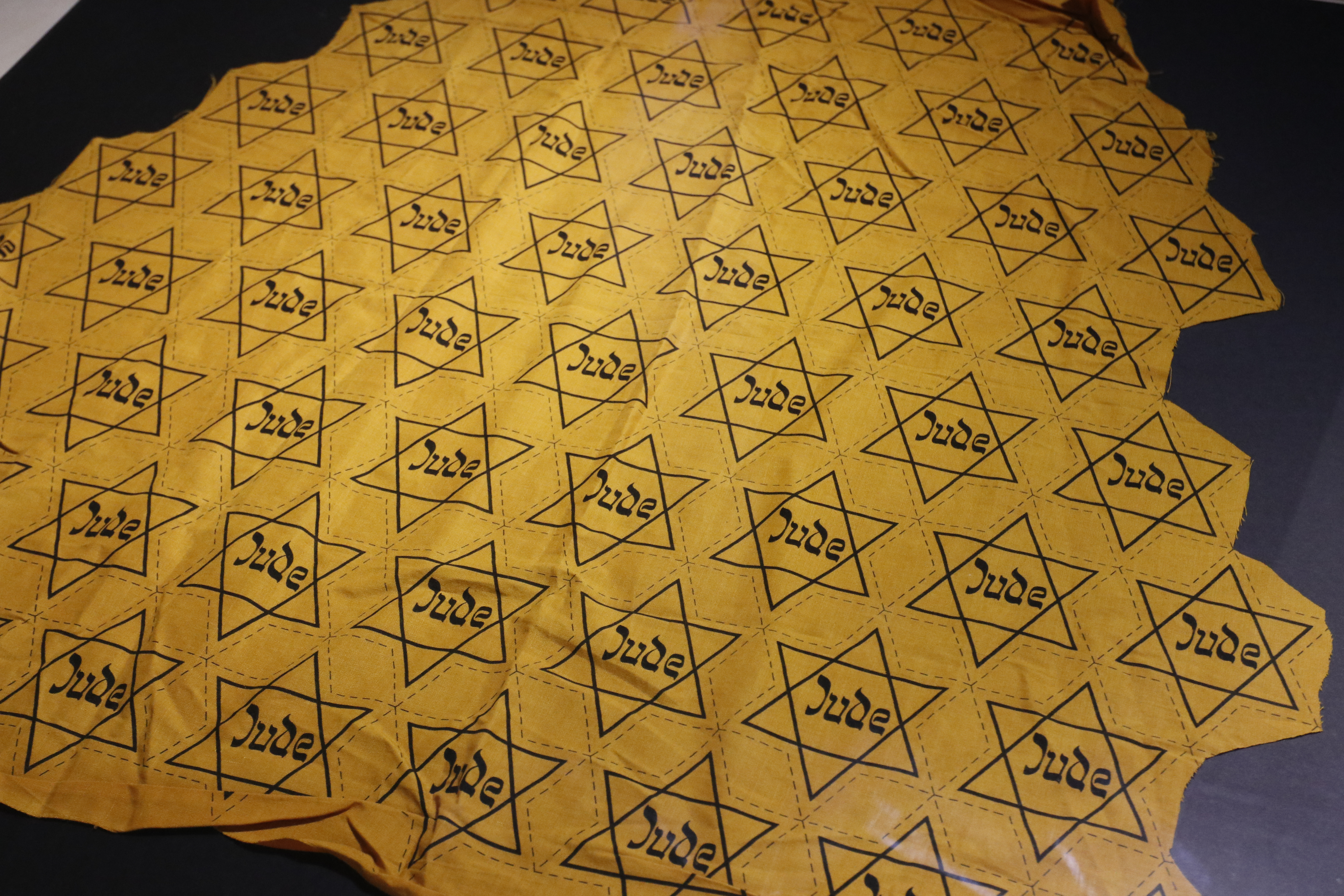 Judensterne auf einer Stoffbahn, Berliner Fahnenfabrik Geitel & Co, 1941/42. Stadtmuseum Hagen, aus dem Nachlass Walter Wolff